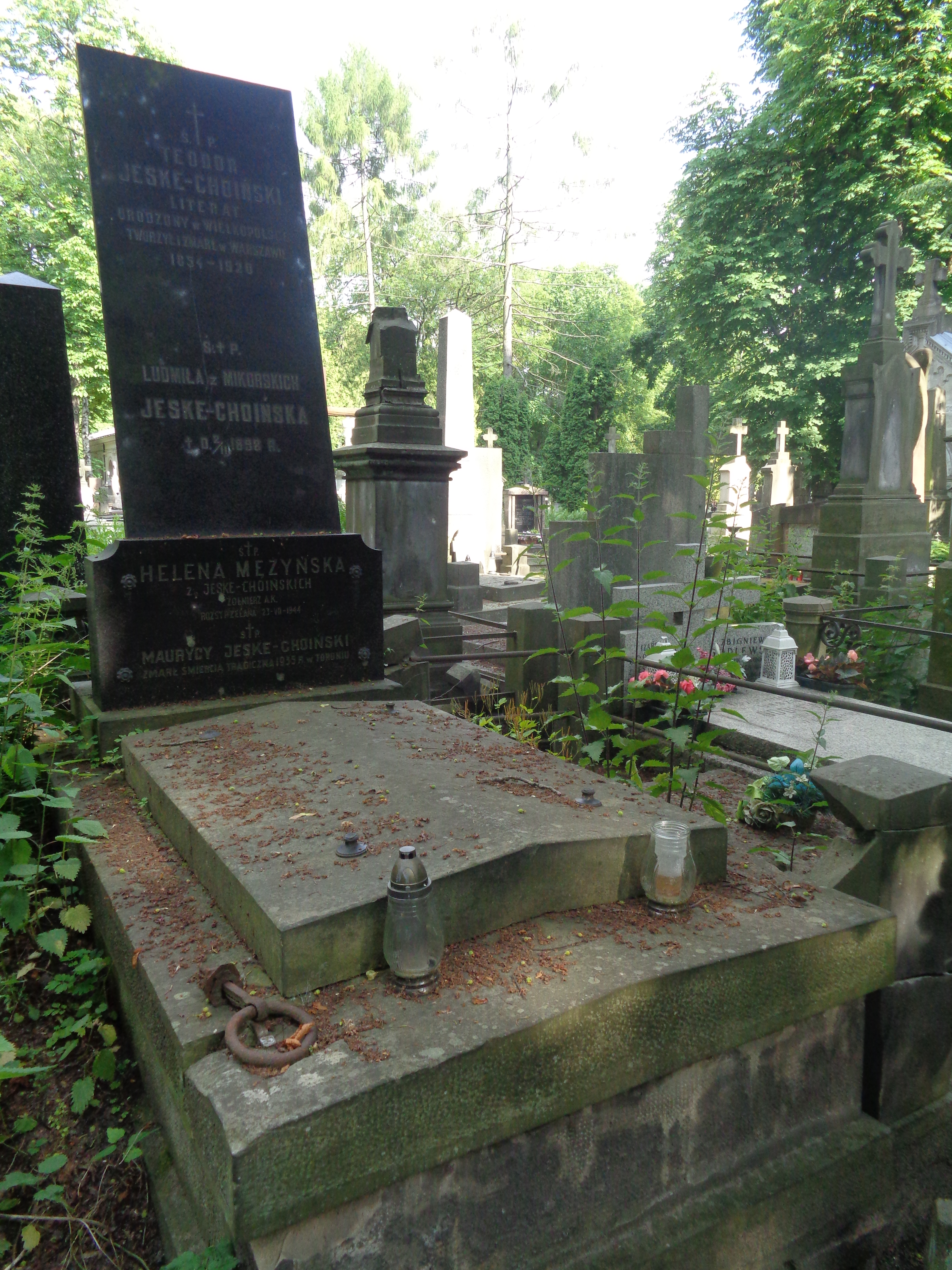 Grób Teodora Jeske-Choińskiego na Cmentarzu Powązkowskim